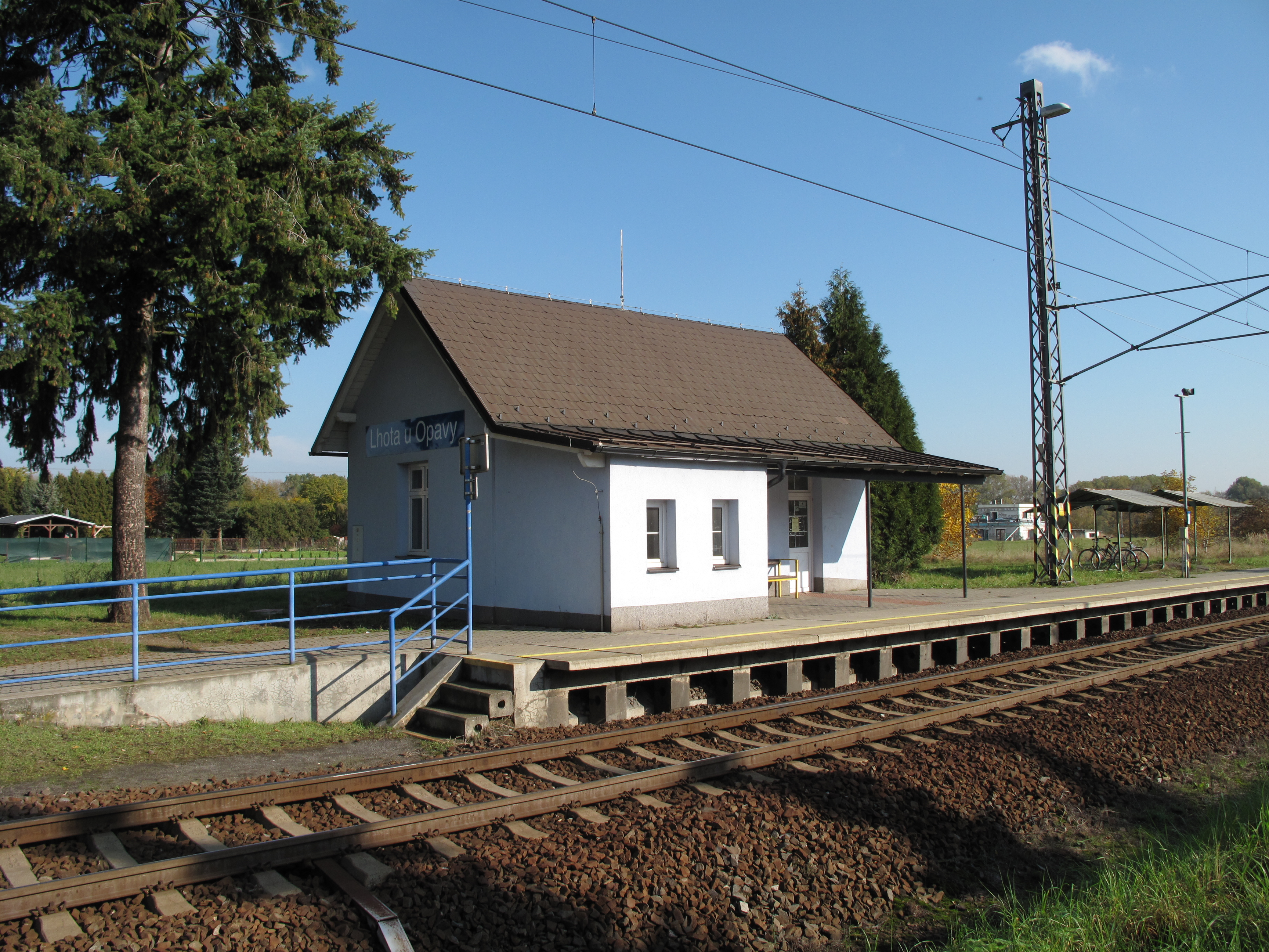 Lhota (Háj ve Slezsku). Okres Opava, Česká republika.